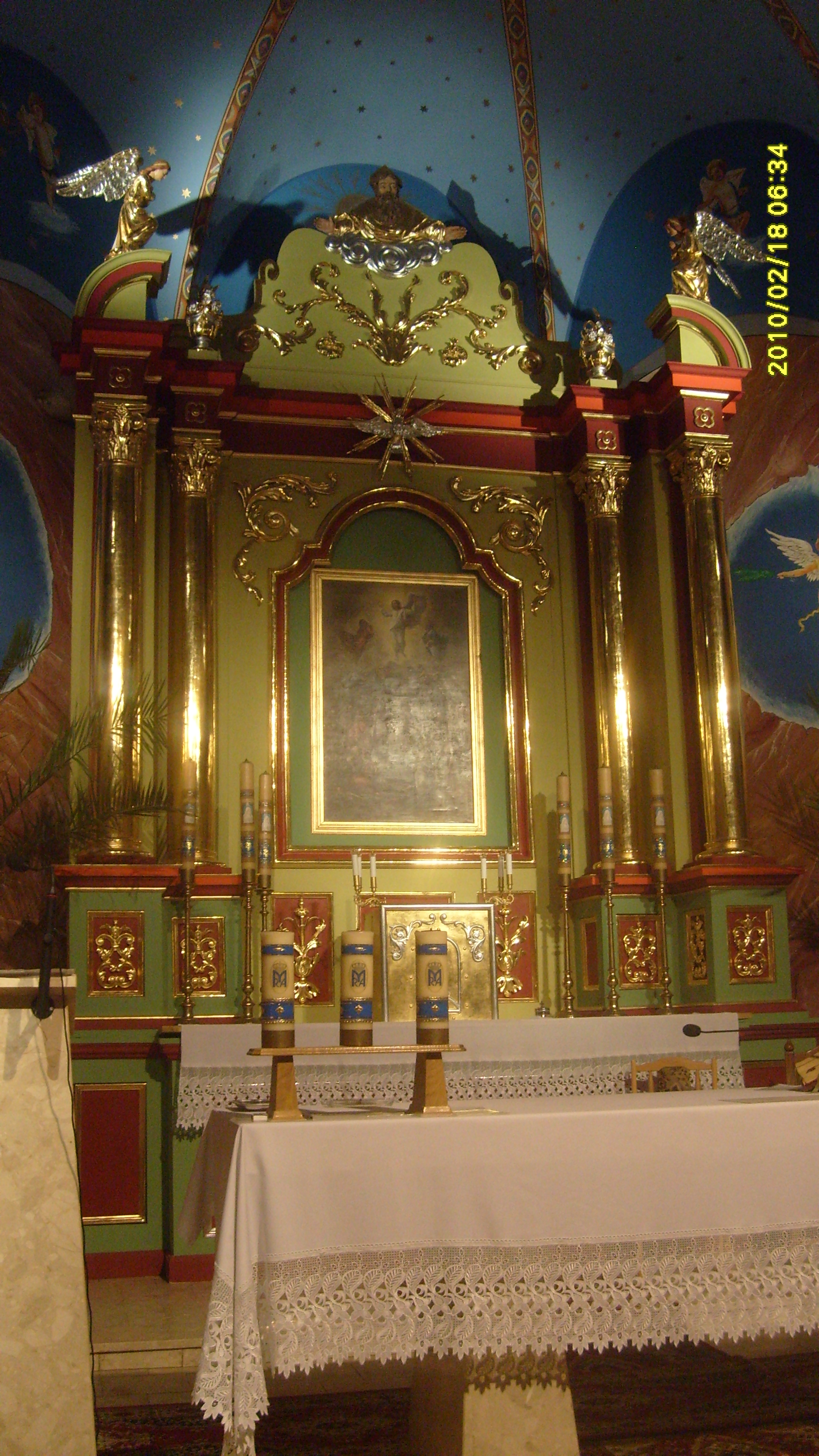 Ołtarz główny z zasłoniętym obrazem Matki Bożej